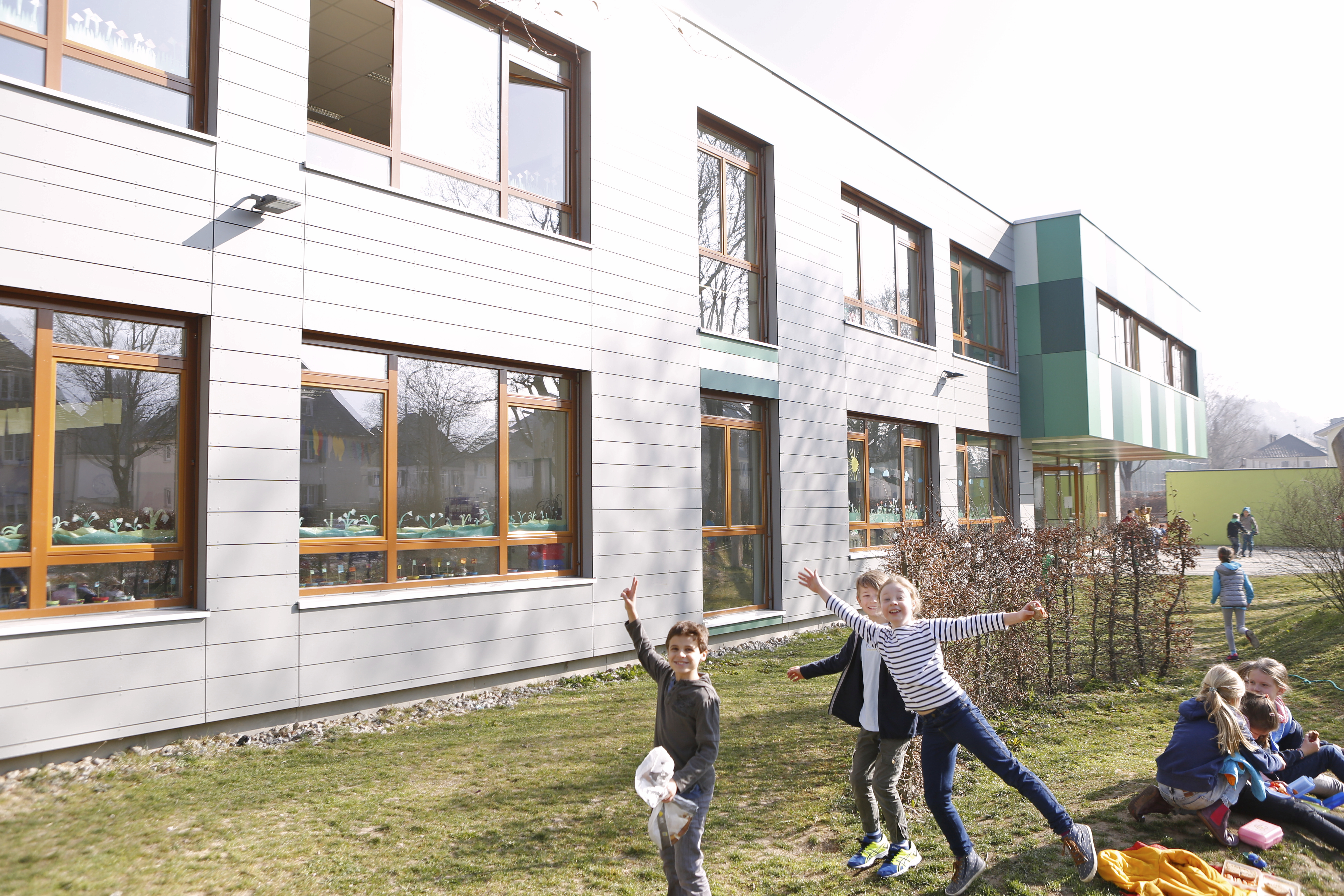 FT-Sportgrundschule